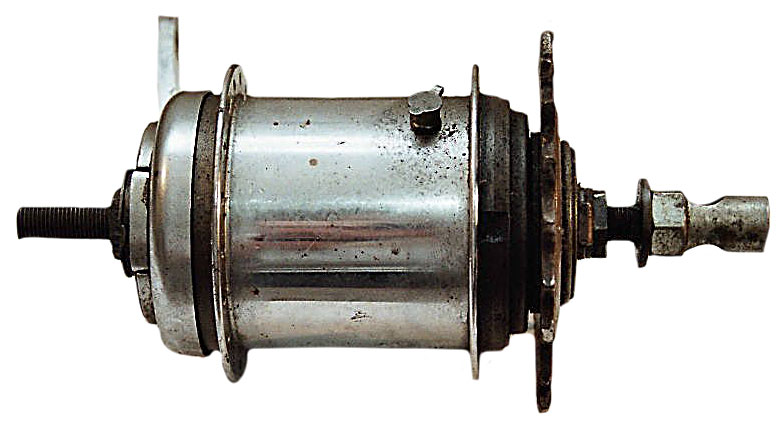 Modell Tricoaster W, ähnlich sieht auch die AW aus